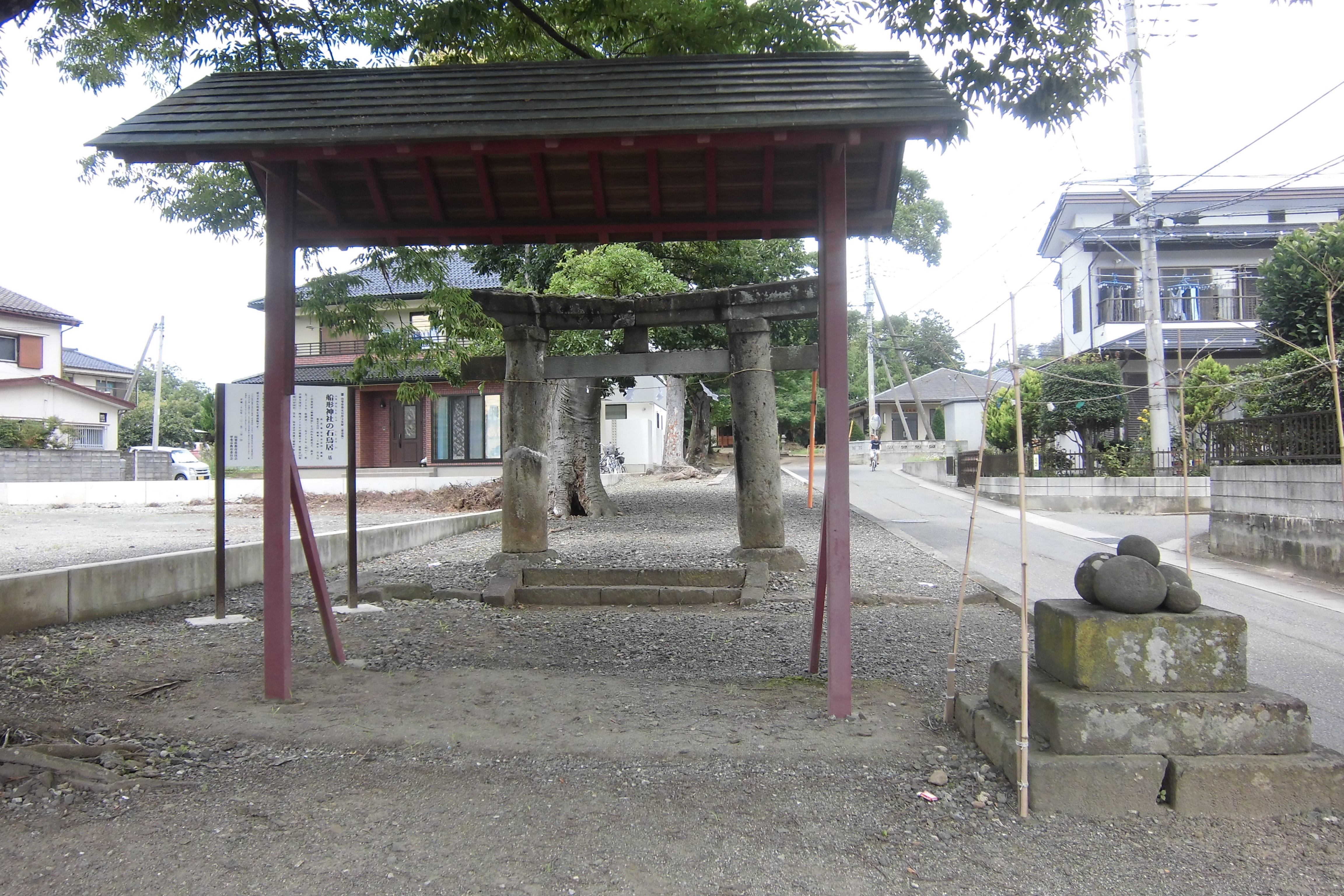 舟形神社と石鳥居（諏訪神社、甲斐市志田）